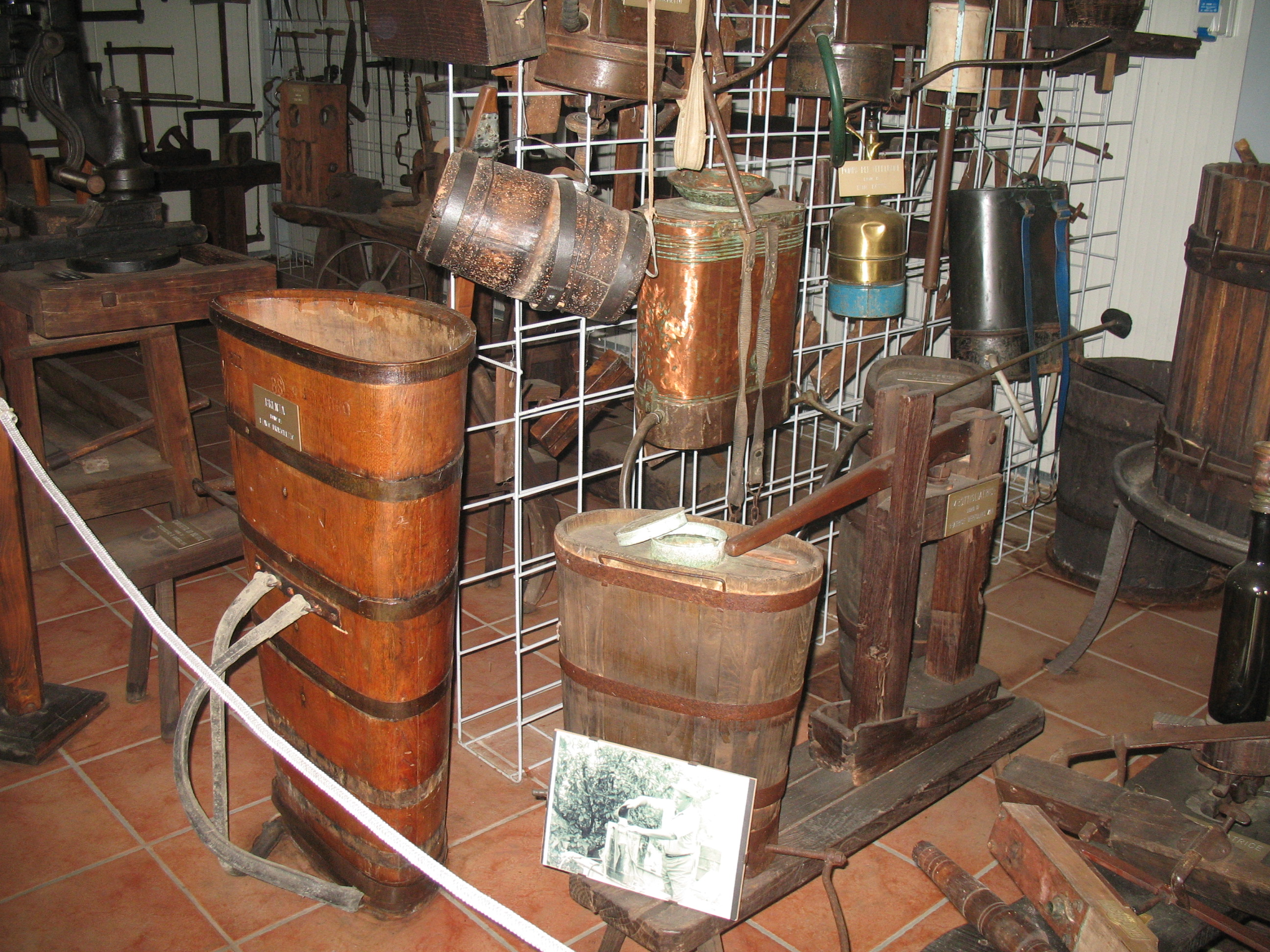 Andrate, provincia di Torino (Piemonte, Italia) - Museo di cultura contadina